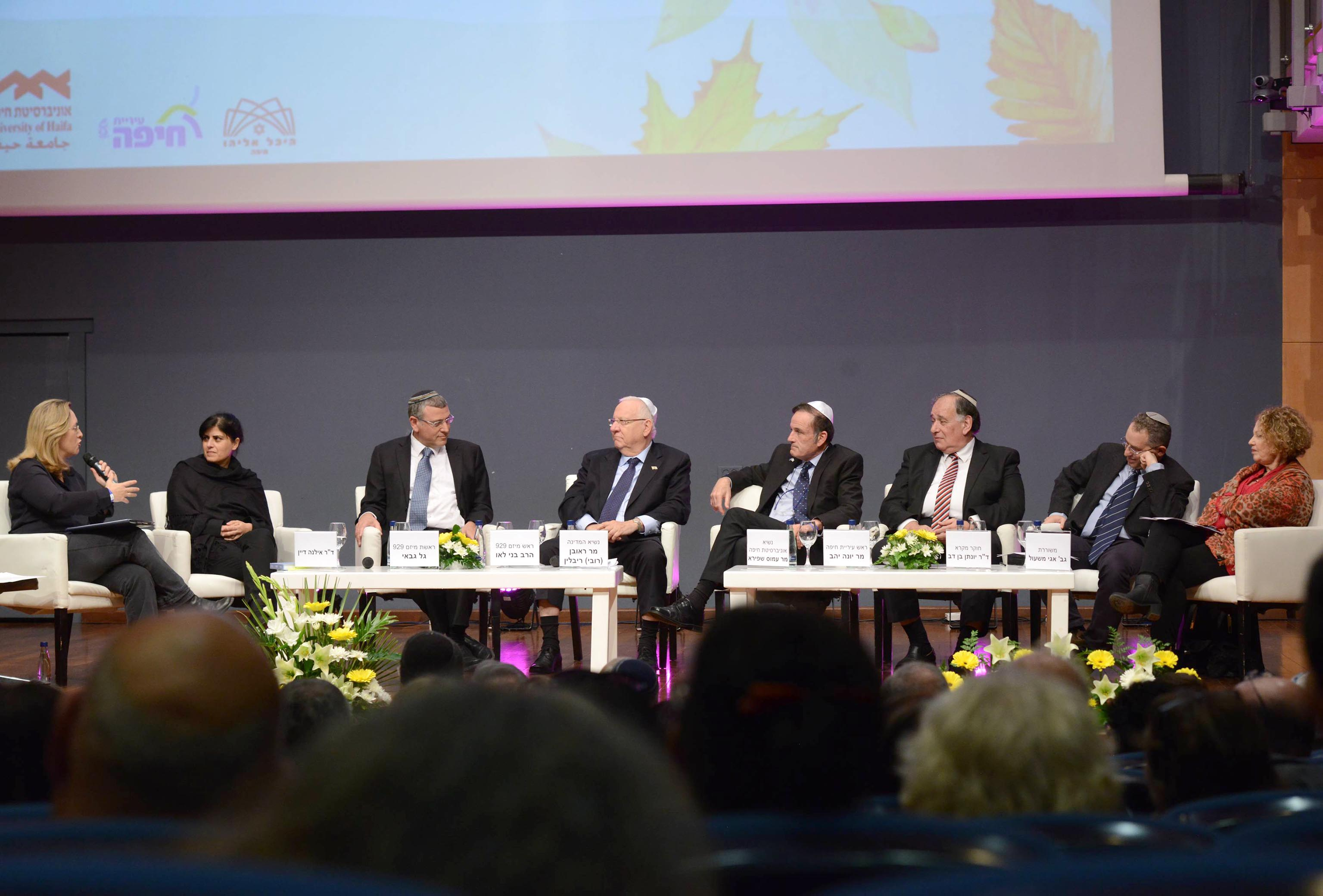 חוג התנ"ך של בית נשיא מדינת ישראל בשיתוף מיזם 929 באוניברסיטת חיפה בתמונה מימין לשמאל אגי משעול, יונתן בן דב, יונה יהב, עמוס שפירא, ראובן ריבלין, בני לאו, גל גבאי ואילנה דיין